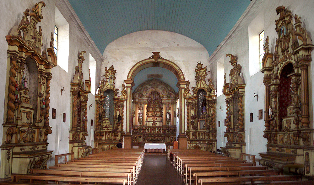 Interior da Igreja Matriz de Nossa Senhora da Conceição, Viamão, Brasil.